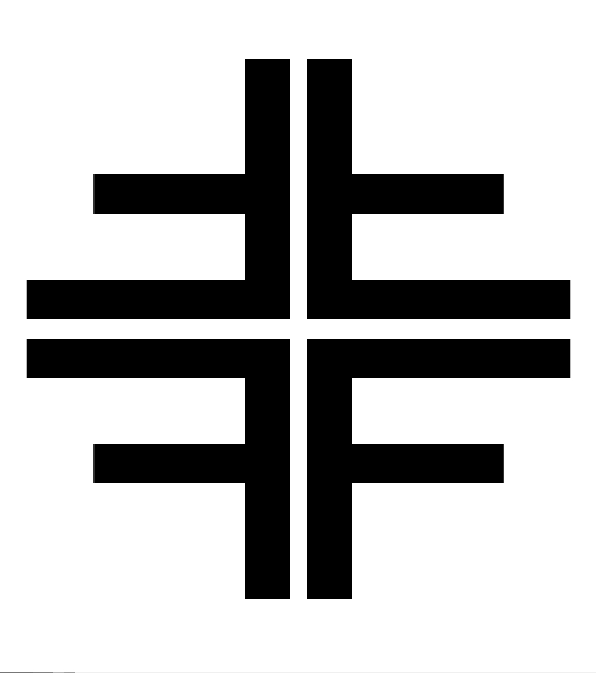 Frisch, fromm, fröhlich, frei, Turnerkreuz frei nach Friedrich Ludwig Jahn